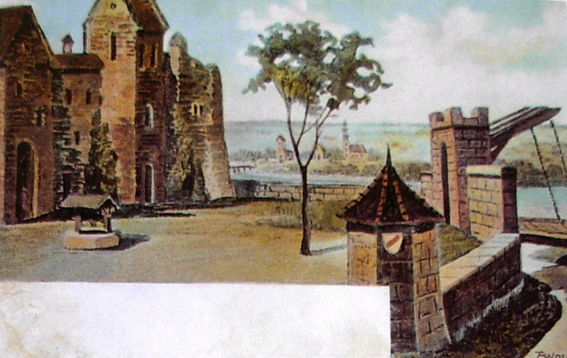 Zamek bydgoski - rycina Augusta Wolffa z 1600 r.